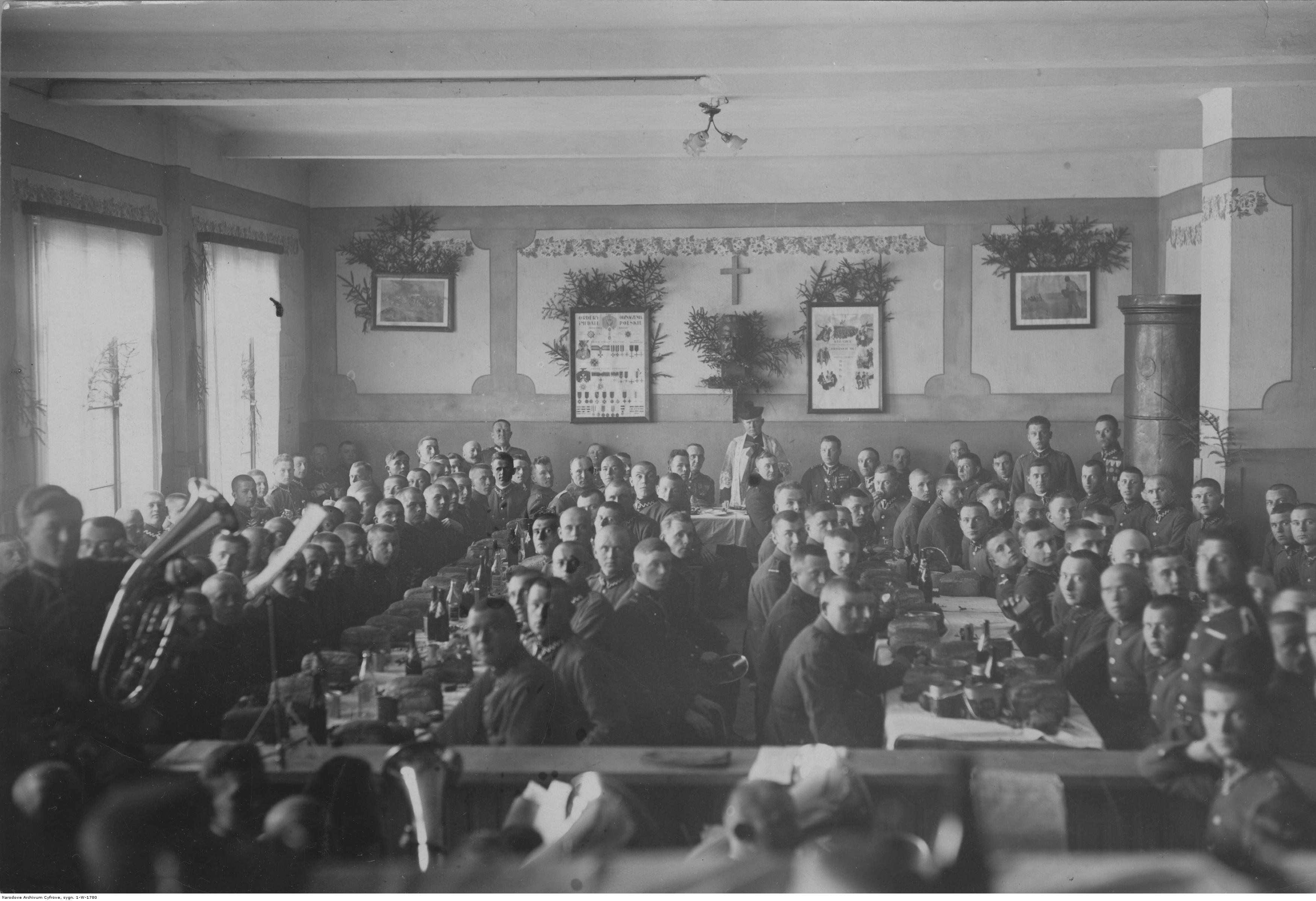 Wigilia w 5 Batalionie Korpusu Ochrony Pogranicza "Łużki". Widok na świetlicę i żołnierzy przy stołach. Na pierwszym planie orkiestra. Koncern Ilustrowany Kurier Codzienny - Archiwum Ilustracji